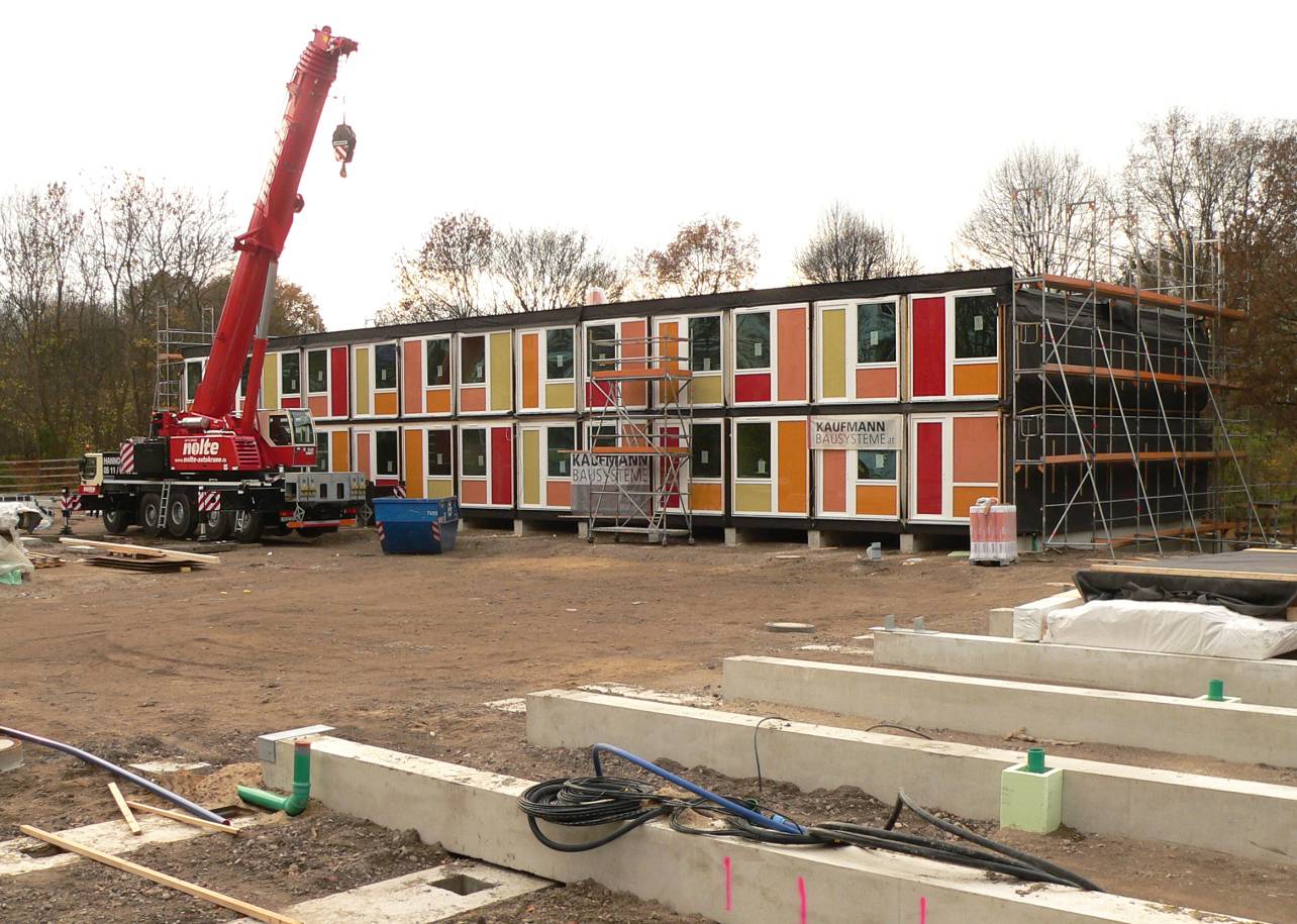 Containerbau für Flüchtlinge in Hannover im Stadtteil Linden-Nord